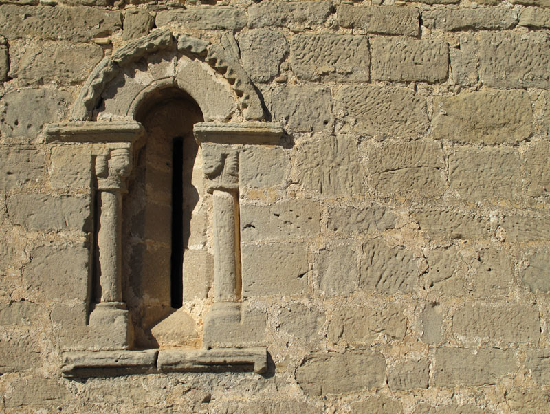 Ventana de la ermita de San Antón en el pueblo de La Nave (Miranda de Ebro, España)